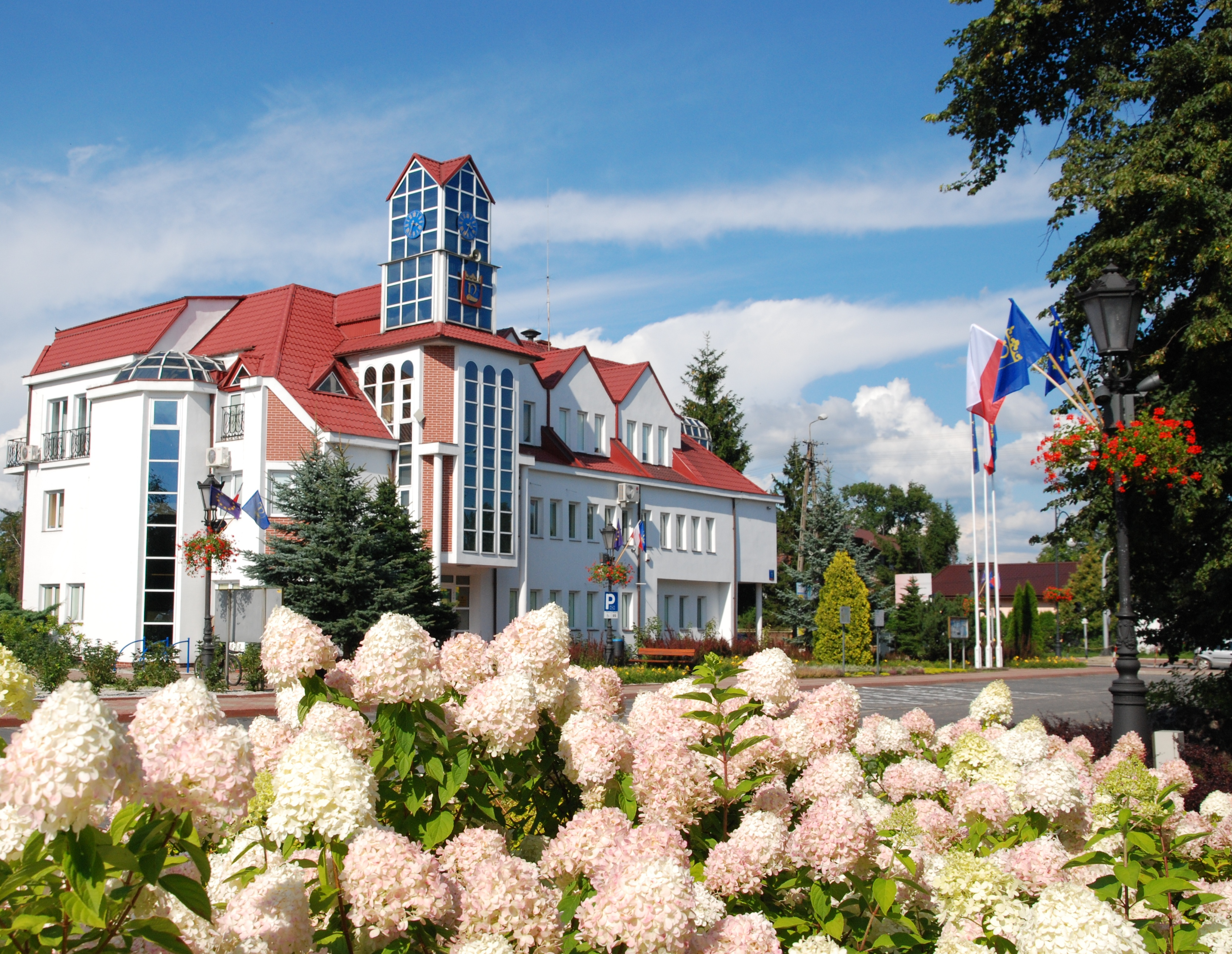 Budynek Urzędu Gminy Nieporęt